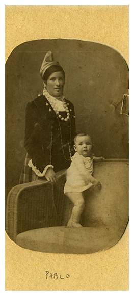 Fotografía de pintor Pablo Palazuelo